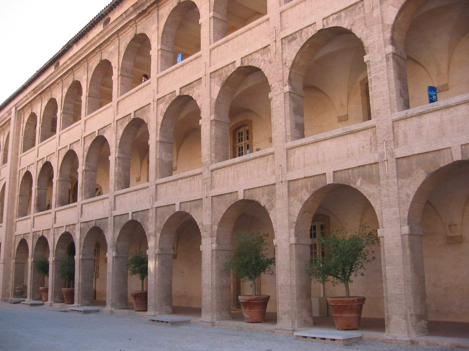 Marseille, Bouches-du-Rhône, France La cour intérieur de l'hospice de La Vieille Charité qui abrite le Musée de la Vieille Charité Photo prise le 19 mai 2006 Aut : Jddmano